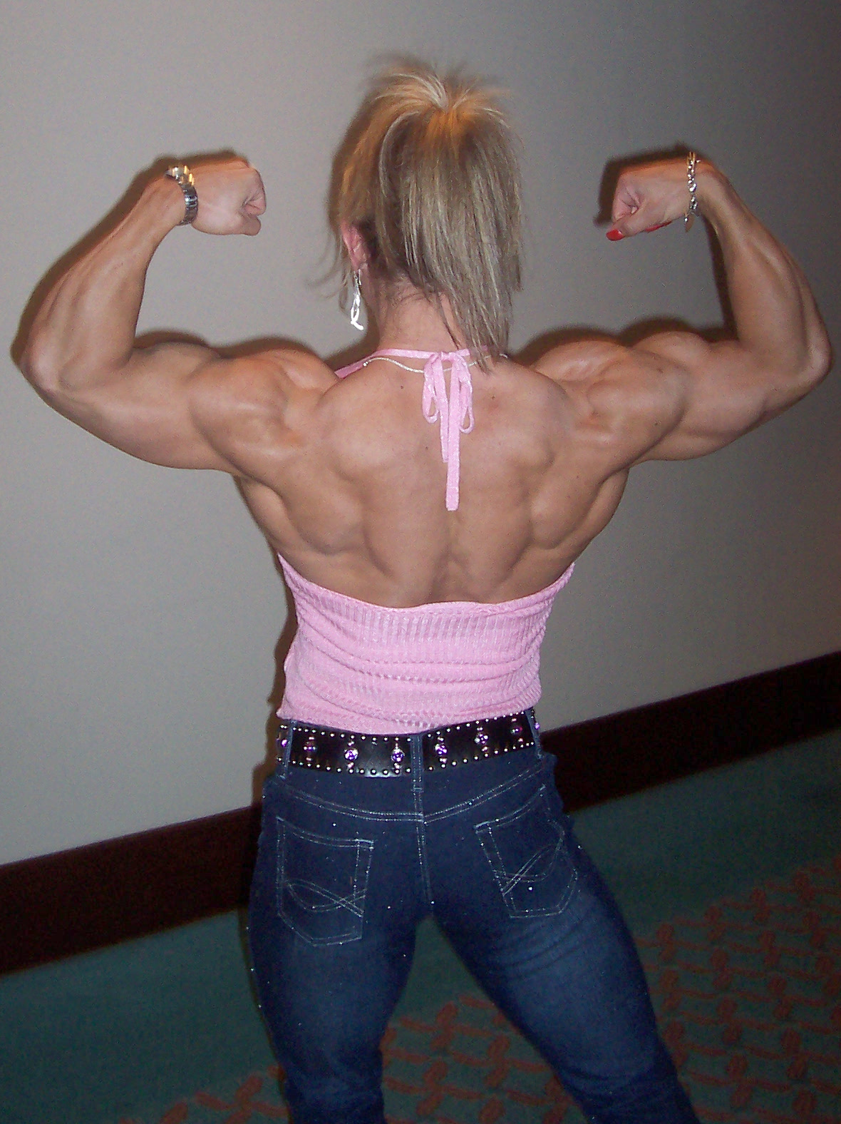 Elena Seiple